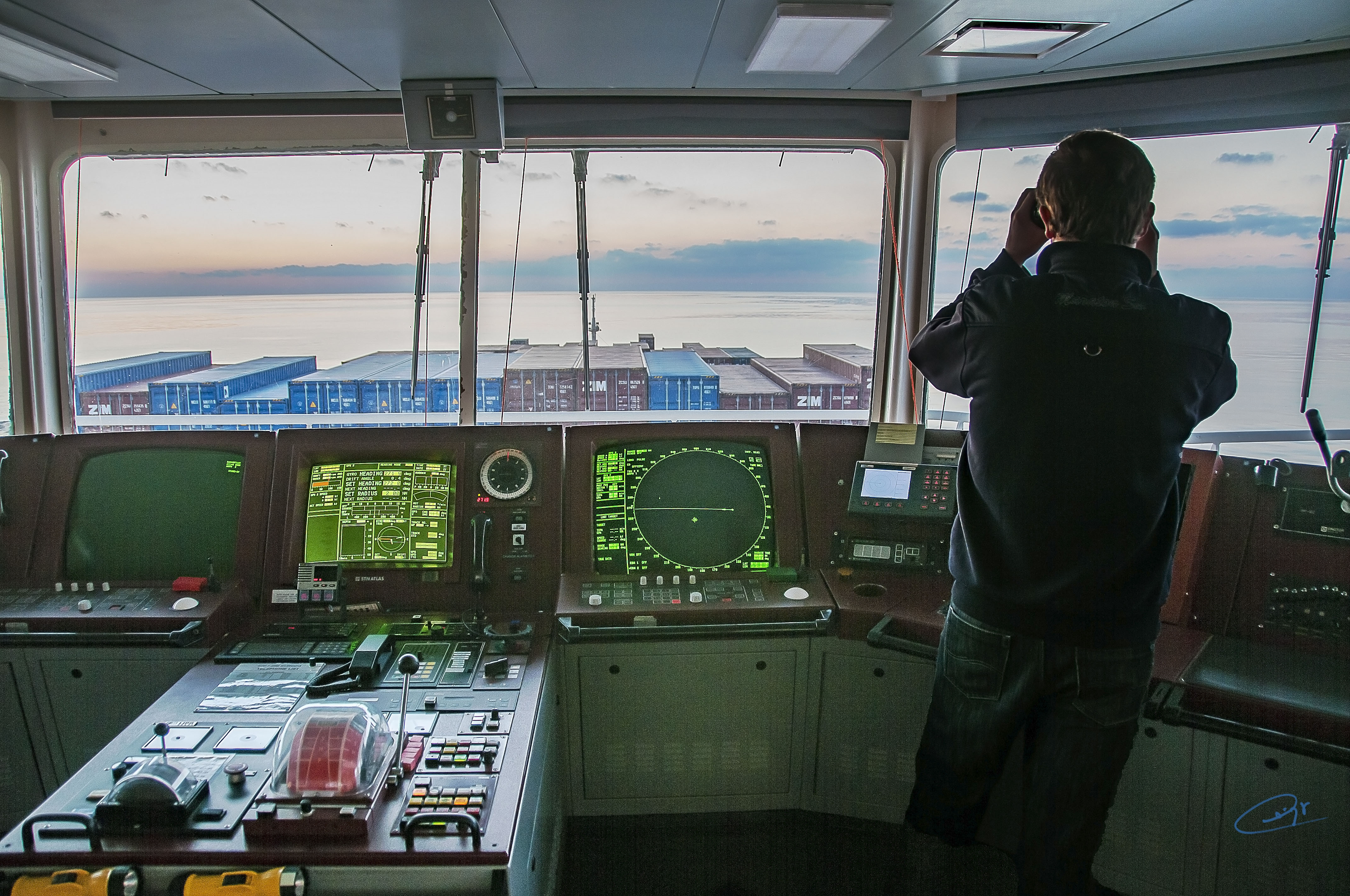 החובל השלישי קצין משמרת גשר באוניית מכולות "צים" בכניסה לנמל